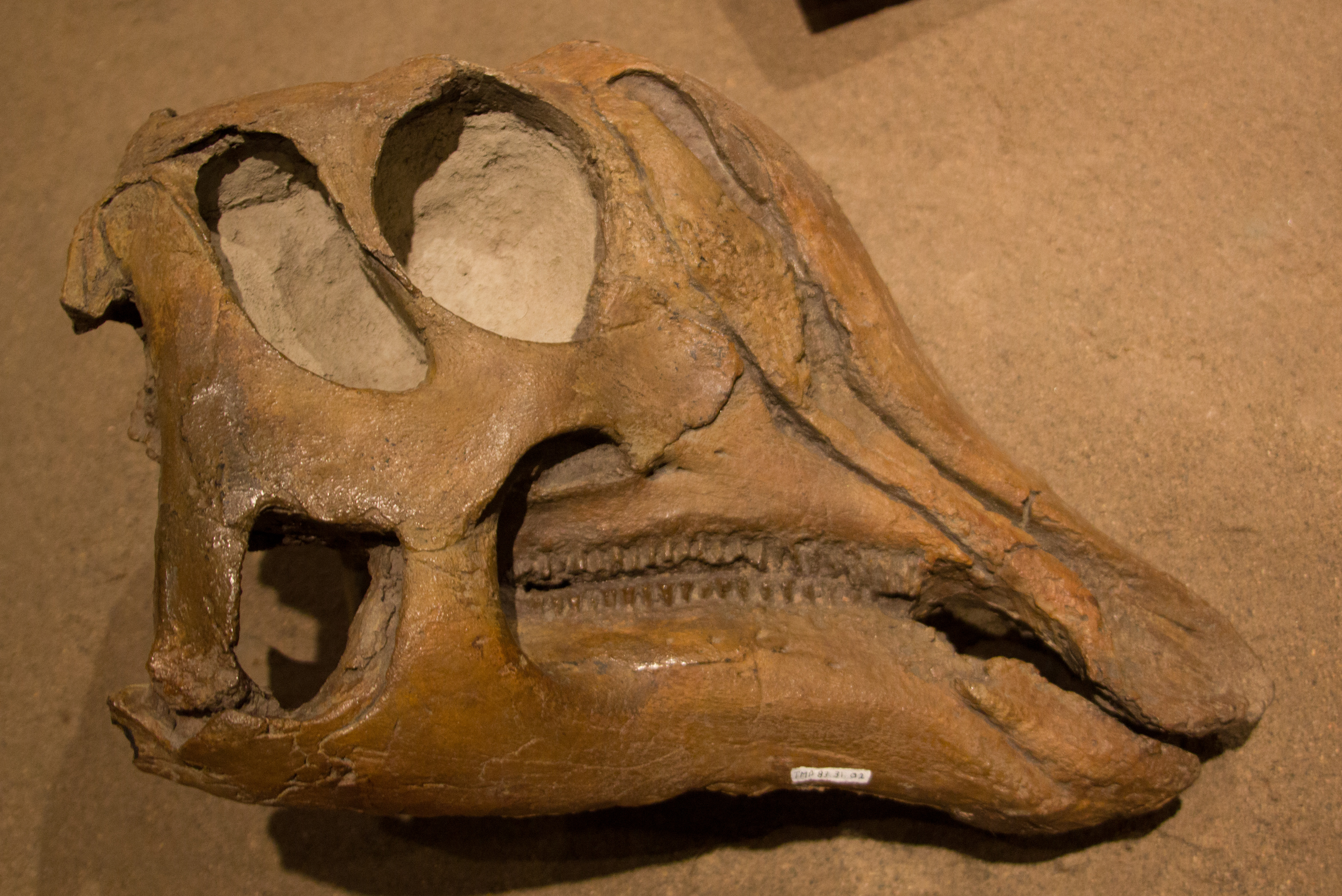 Juvenile Lambeosaurus sp. specimen TMP 1983.031.0002. [1]